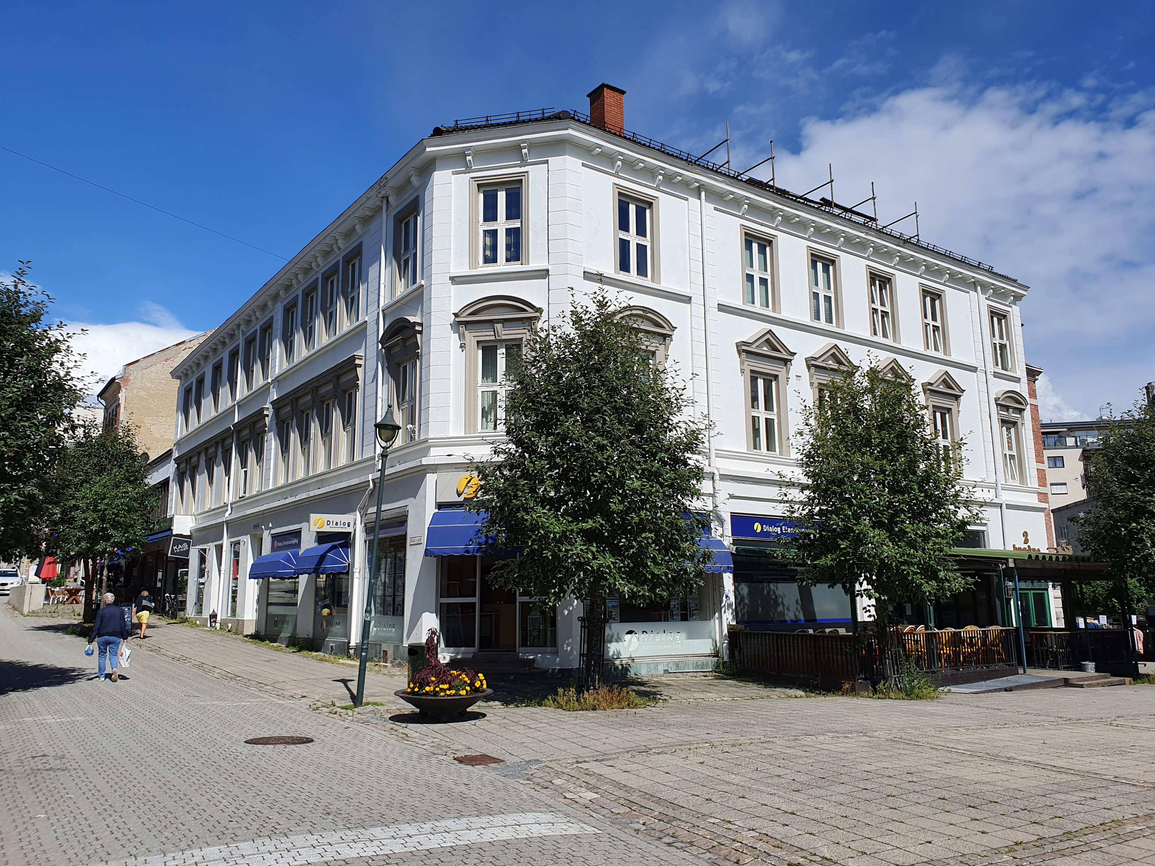 Fasade mot Søndre torv og Stabells gate. Opprinnelig bygget i 1887, men senere utvidet ved to anledninger